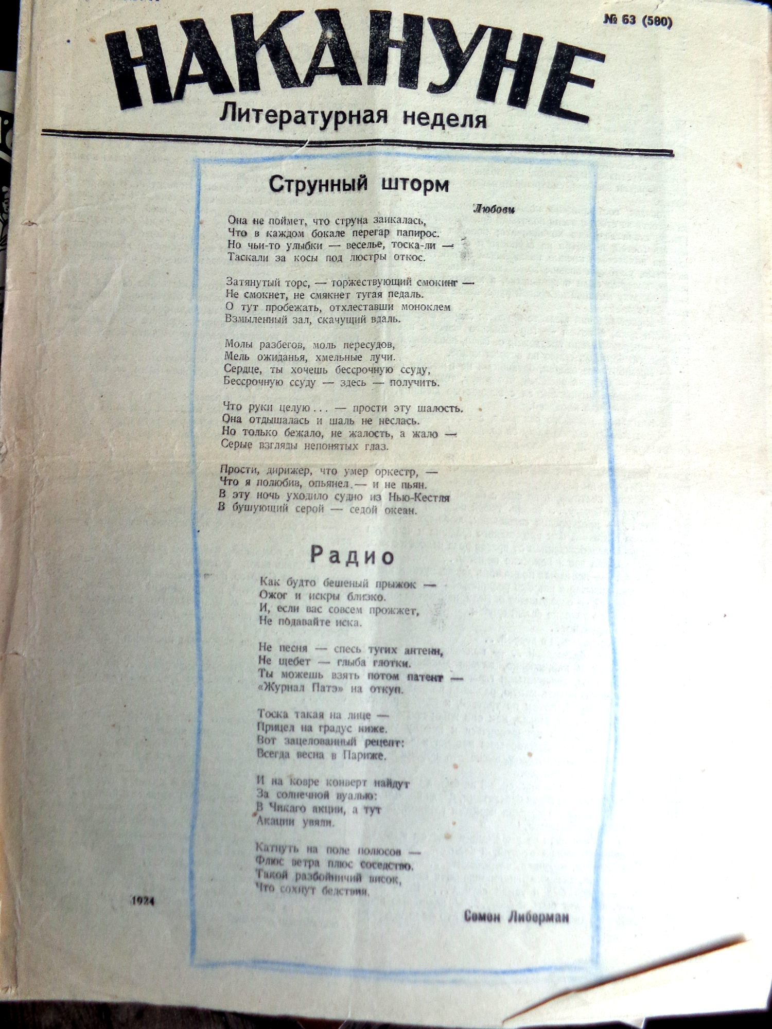 Первая полоса газеты «Накануне» № 63, 1924 год. Стихотворения Семёна Либермана. Редактор С. С. Лукьянов.